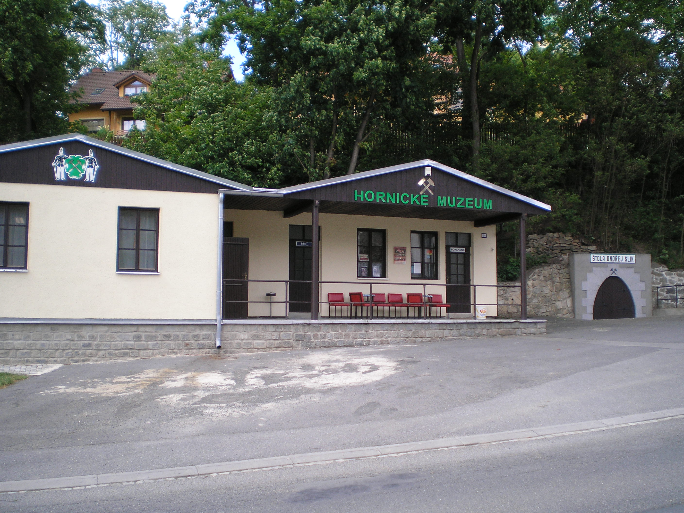 Hornické muzeum Planá